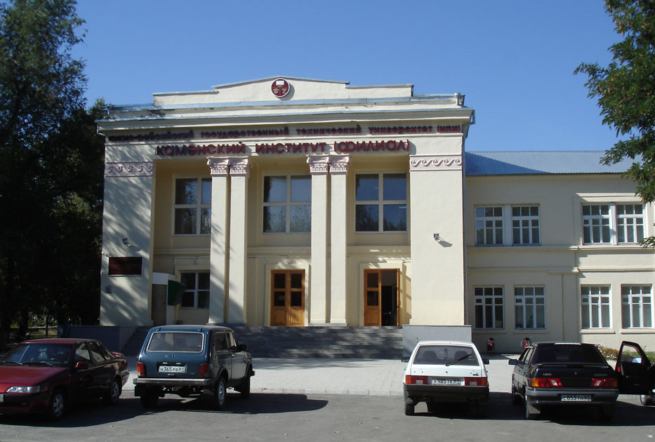 Фотография Каменского института, филиал НПИ